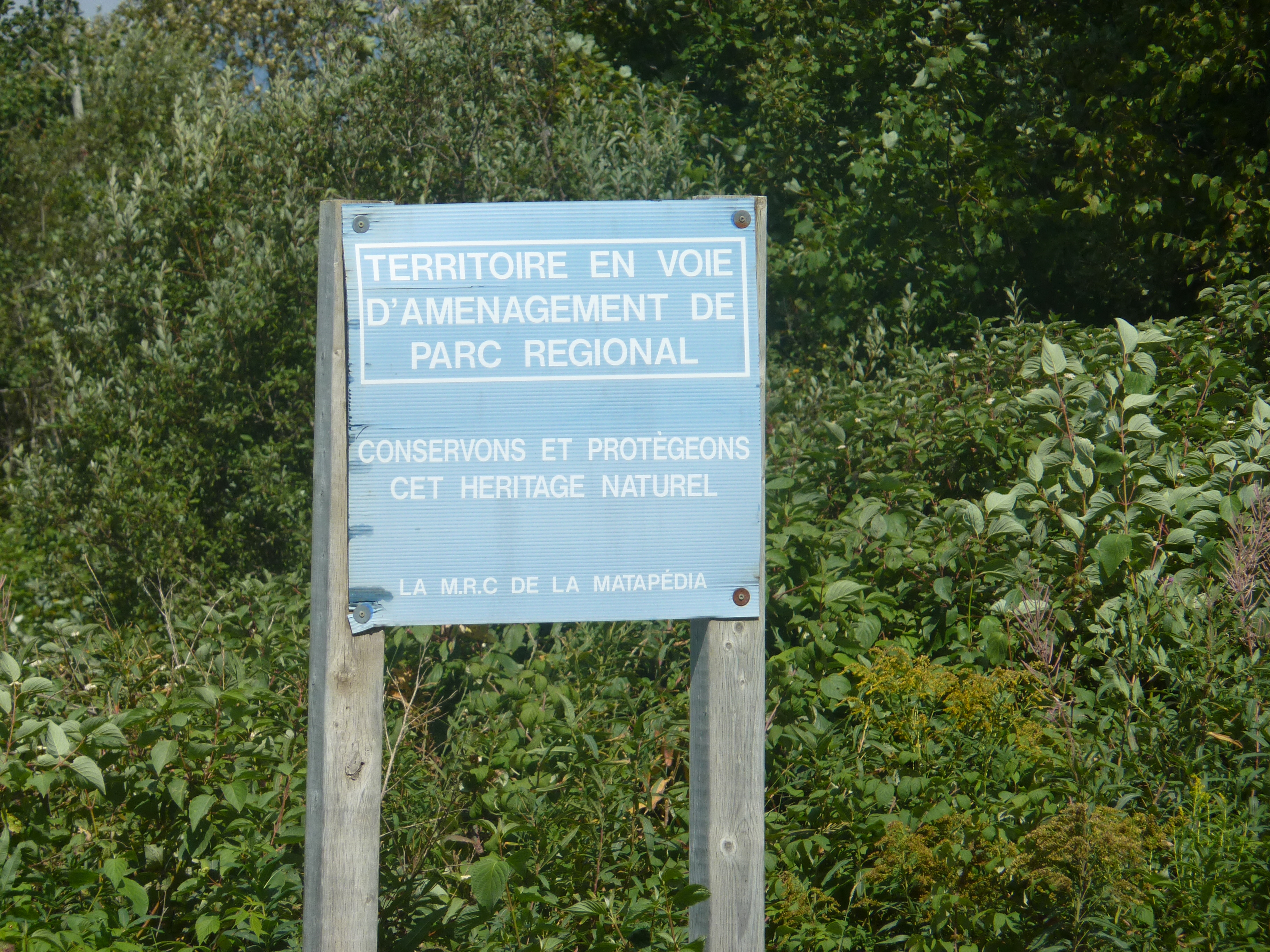 Pancarte annonçant que le secteur de la Seigneurie du Lac-Matapédia est en voie d'aménagement en parc régional